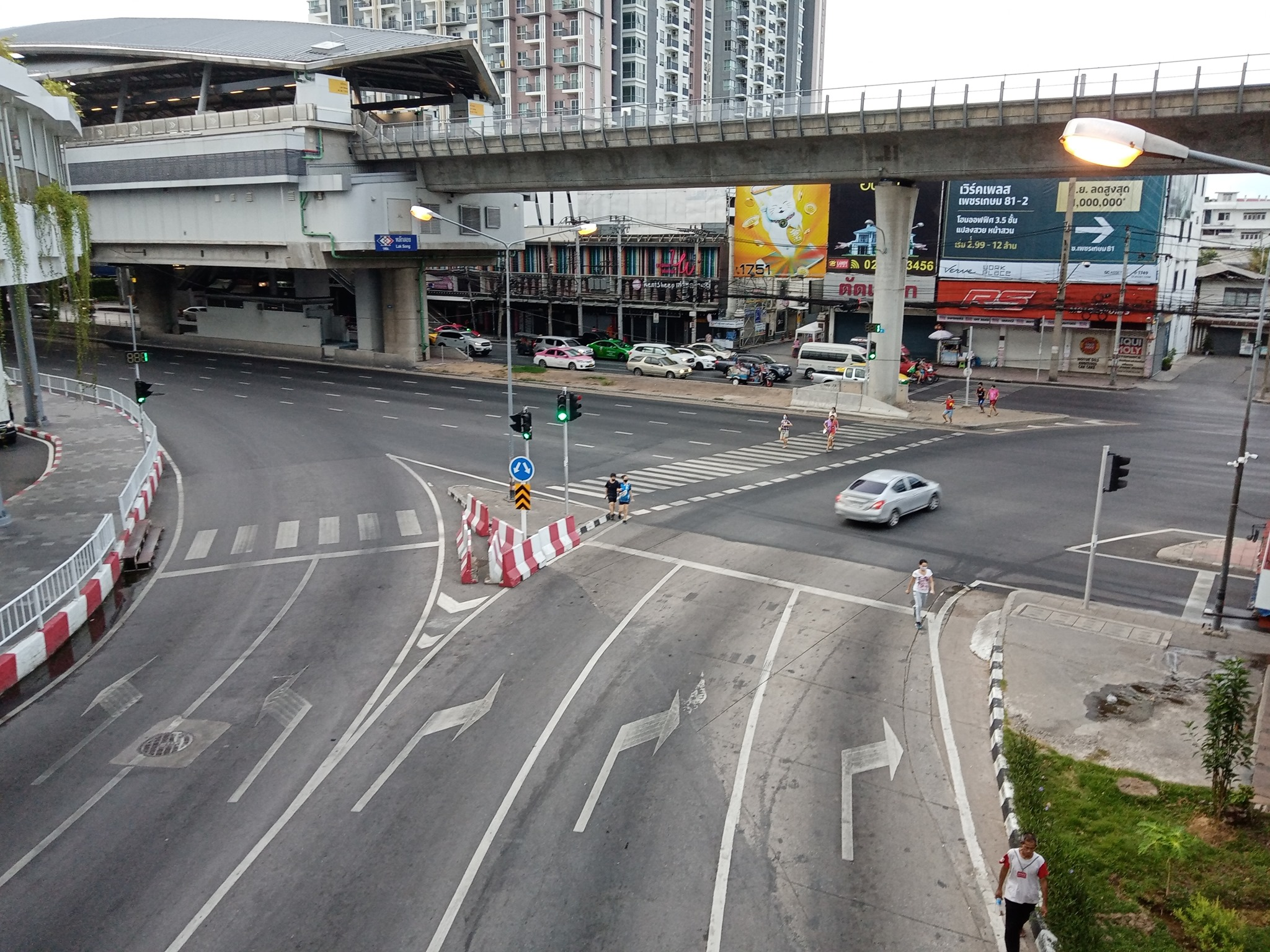 แยกเพชร-กาญจนา เป็นสี่แยกที่ตัดกันของถนนกาญจนาภิเษก, ถนนเพชรเกษม และซอยเพชรเกษม 47/2 ในพื้นที่แขวงบางแคเหนือ เขตบางแค